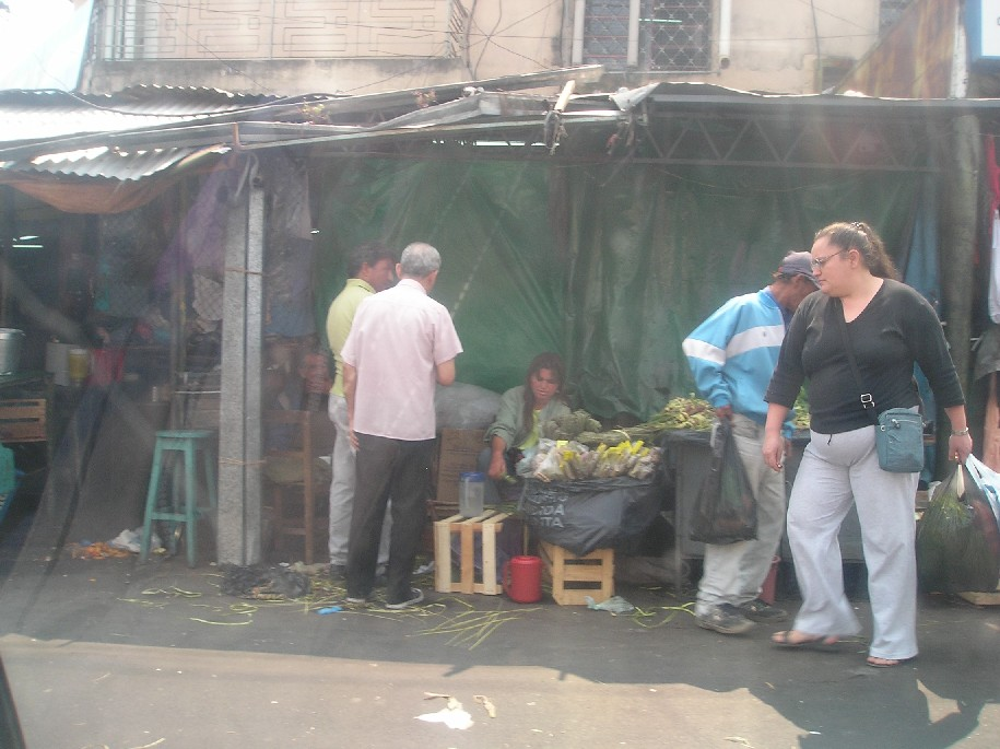 Asunción. Mercado 4. Vendedora de yuyos